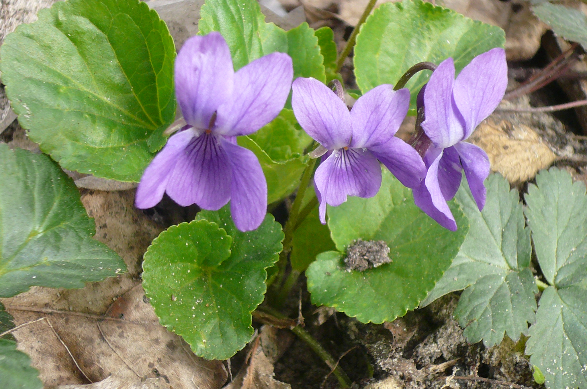 Pospolita w Lesie Bemowskim bylina - fiołek wonny